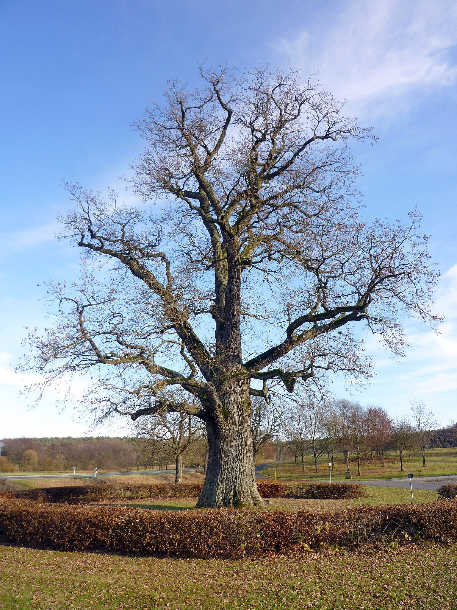 Bildeiche Albertshausen